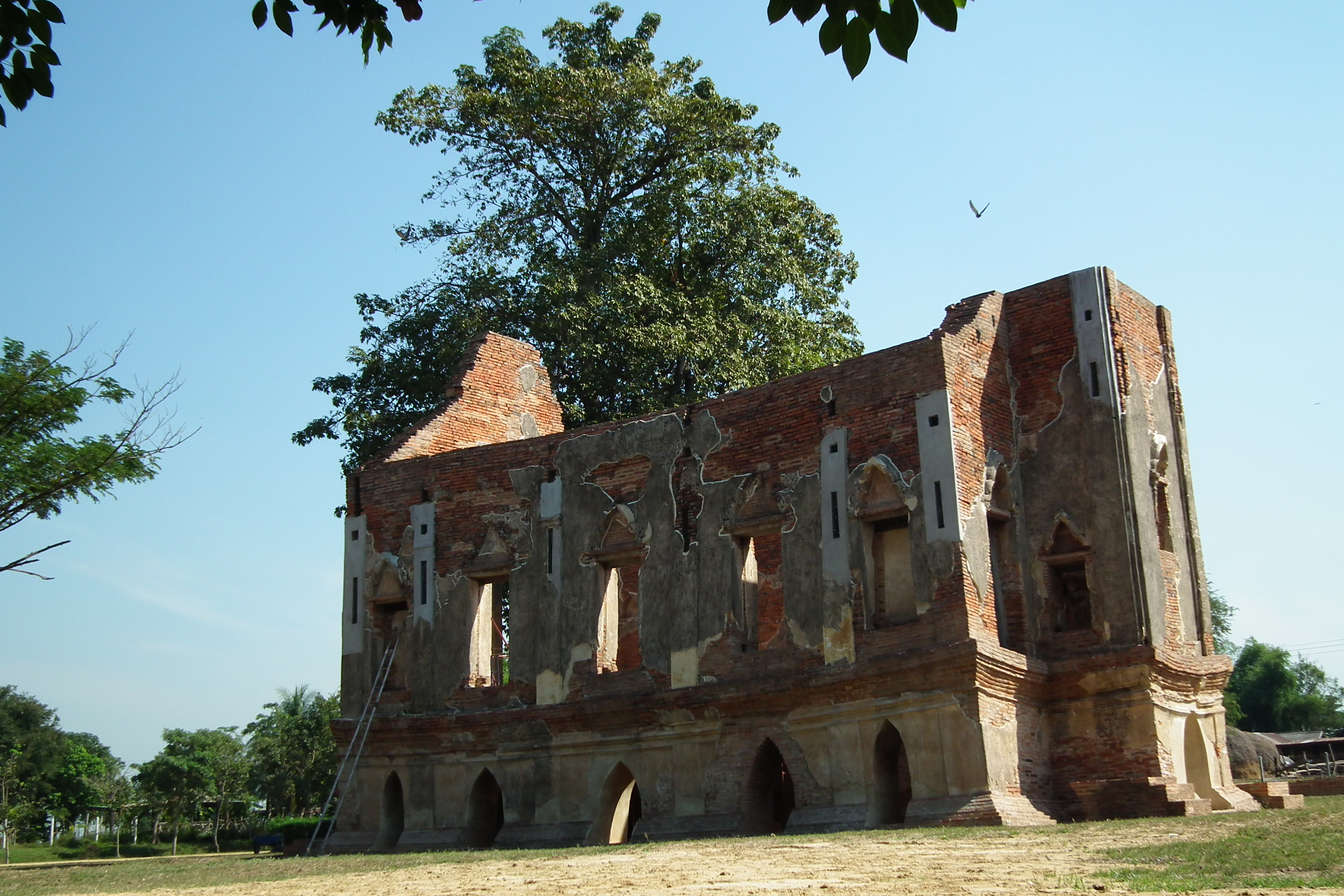 พระตำหนักคำหยาด(พระที่นั่งคำหยาด)